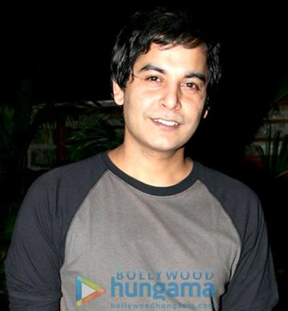 Gaurav Gera at unveils Shefali Sharma's music album